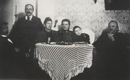 Fotograaf Jakob Jobso-Livenström (paremalt esimene) Paides oma pereliikmete keskel. Teiste pereliikmete nimed ja sugulusastmed on teadmata.